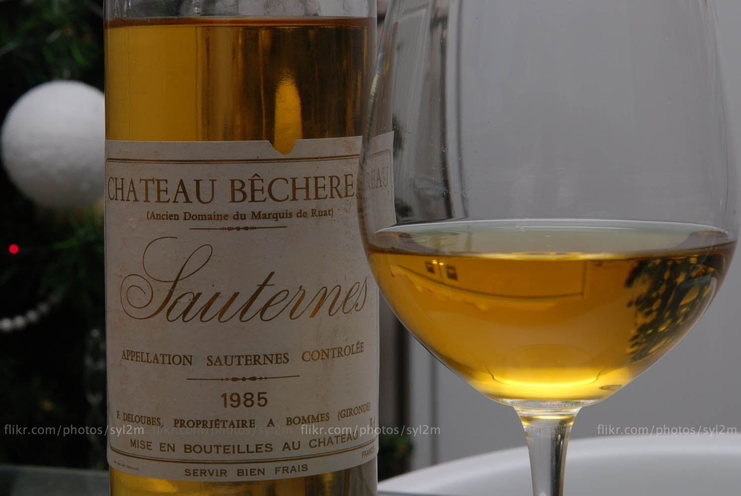 Sauternes château BECHEREAU 1985 Appellation : Sauternes Région viticole : Bordelais Pays : France Type : Liquoreux French dessert wine